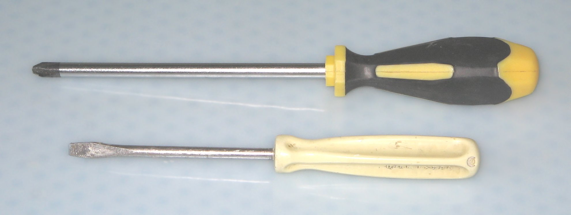 Sxrauxbturniloj La foto estis farita de mi mem.